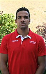 Carlos Augusto dos Santos da Silva ,noto con lo pseudonimo Kaká, giocatore brasiliano di calcio a 5